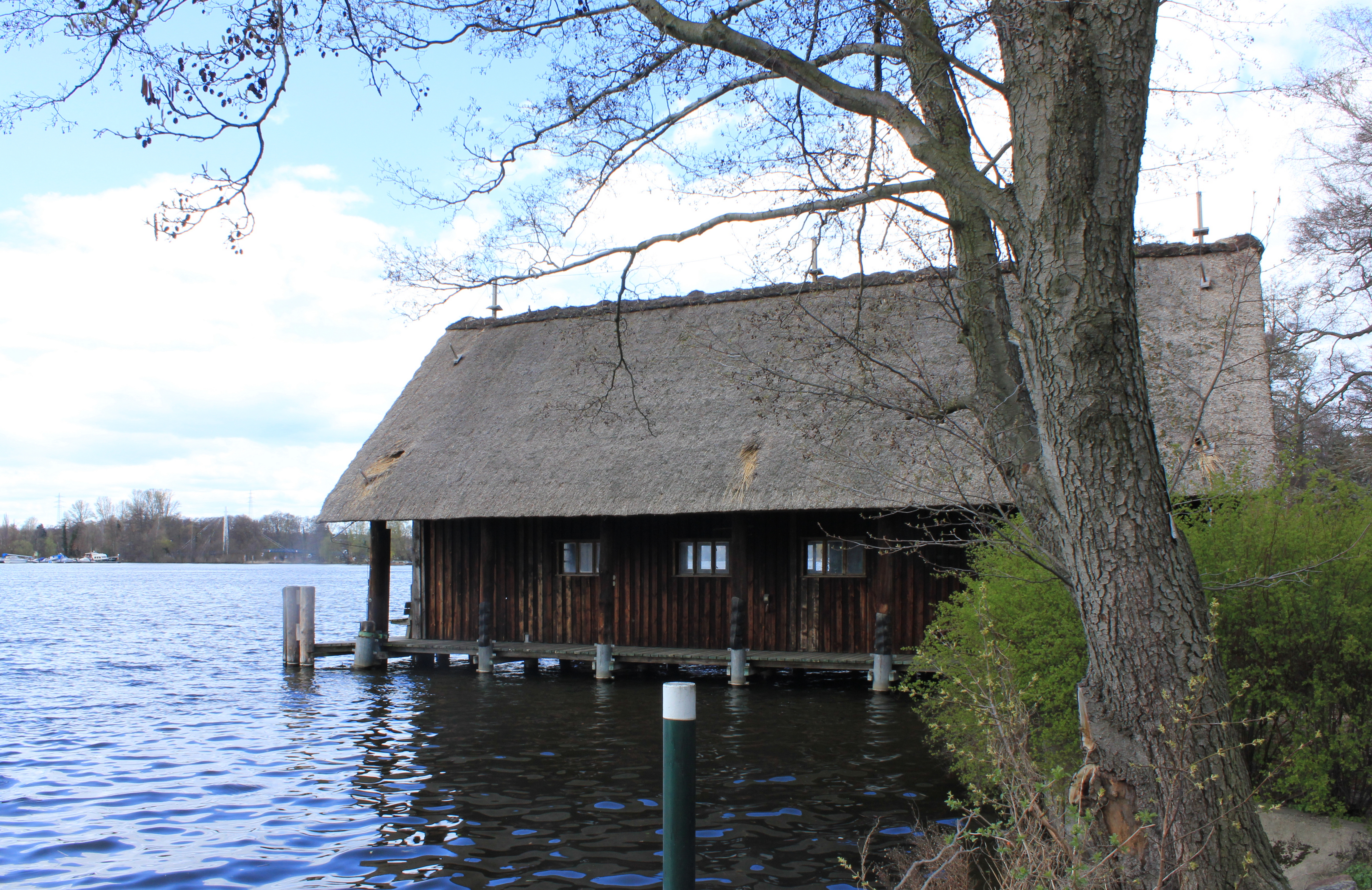 Wohn- und Bootshaus 1930-32 von Richard Schimmeyer